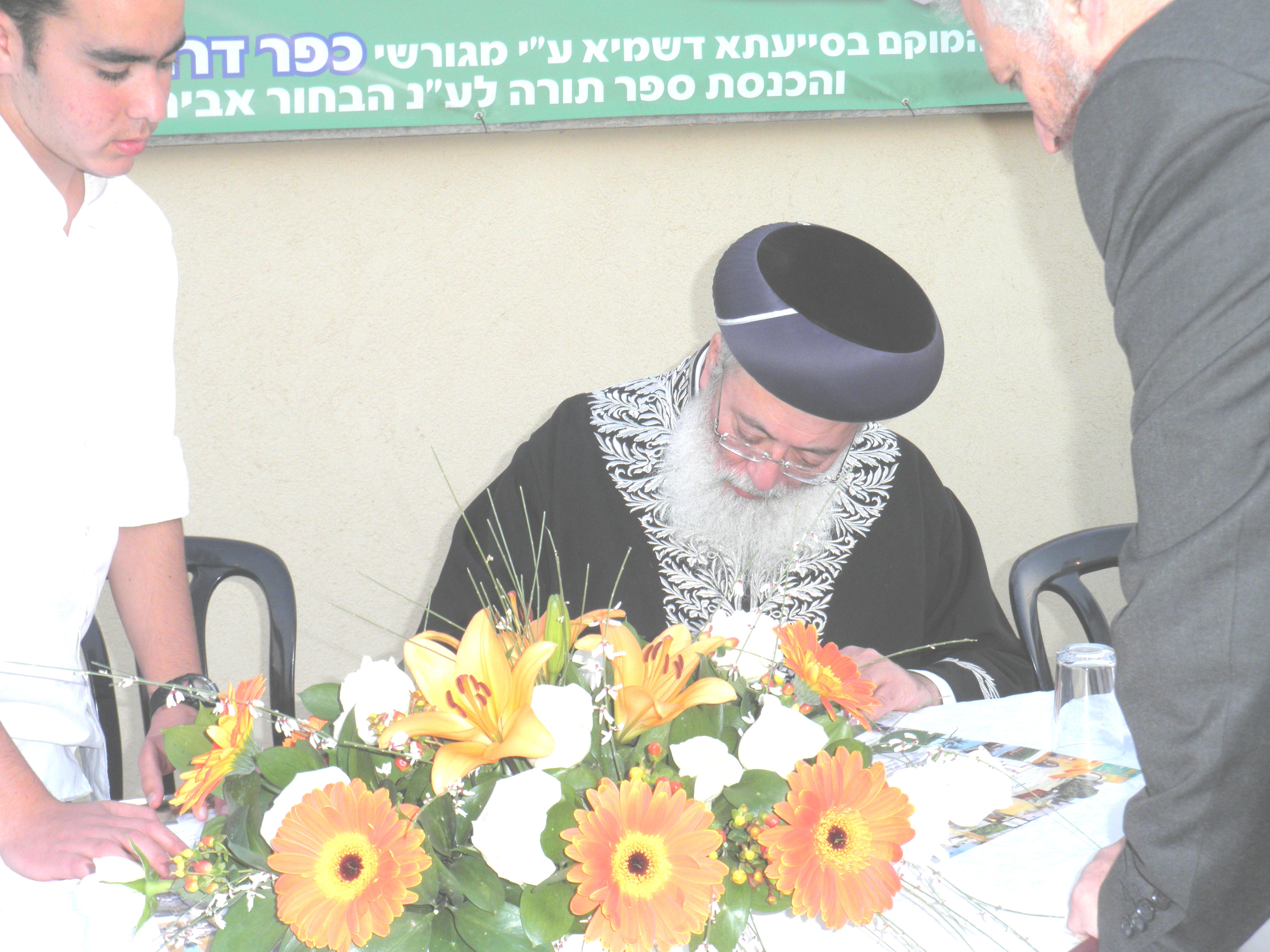 הראשון לציון הרב עמאר בטקס העלייה לקרקע בשבי דרום